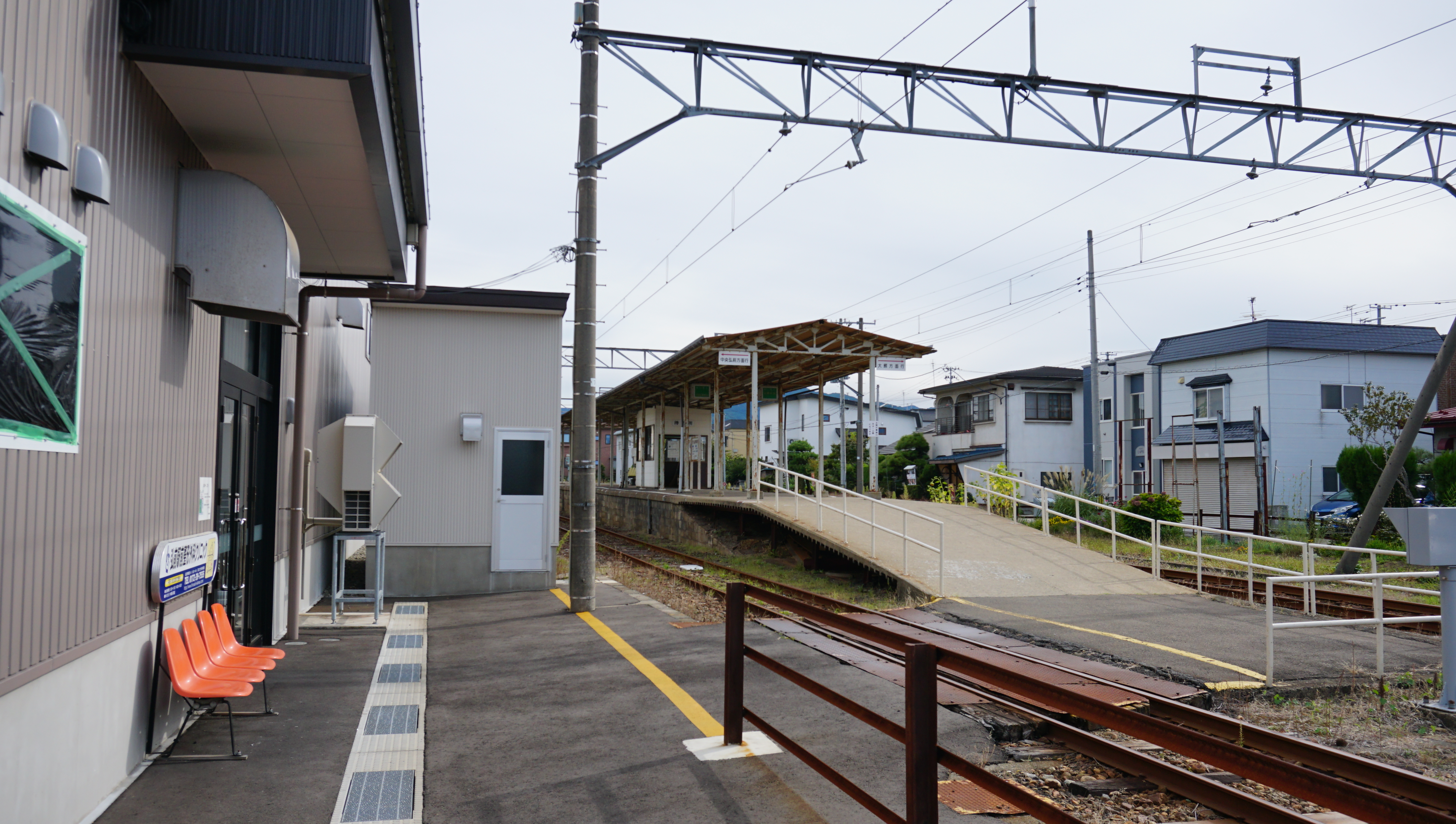 弘南鉄道大鰐線・弘前学院大前駅プラットホーム。左の建物はコープあおもり西弘店